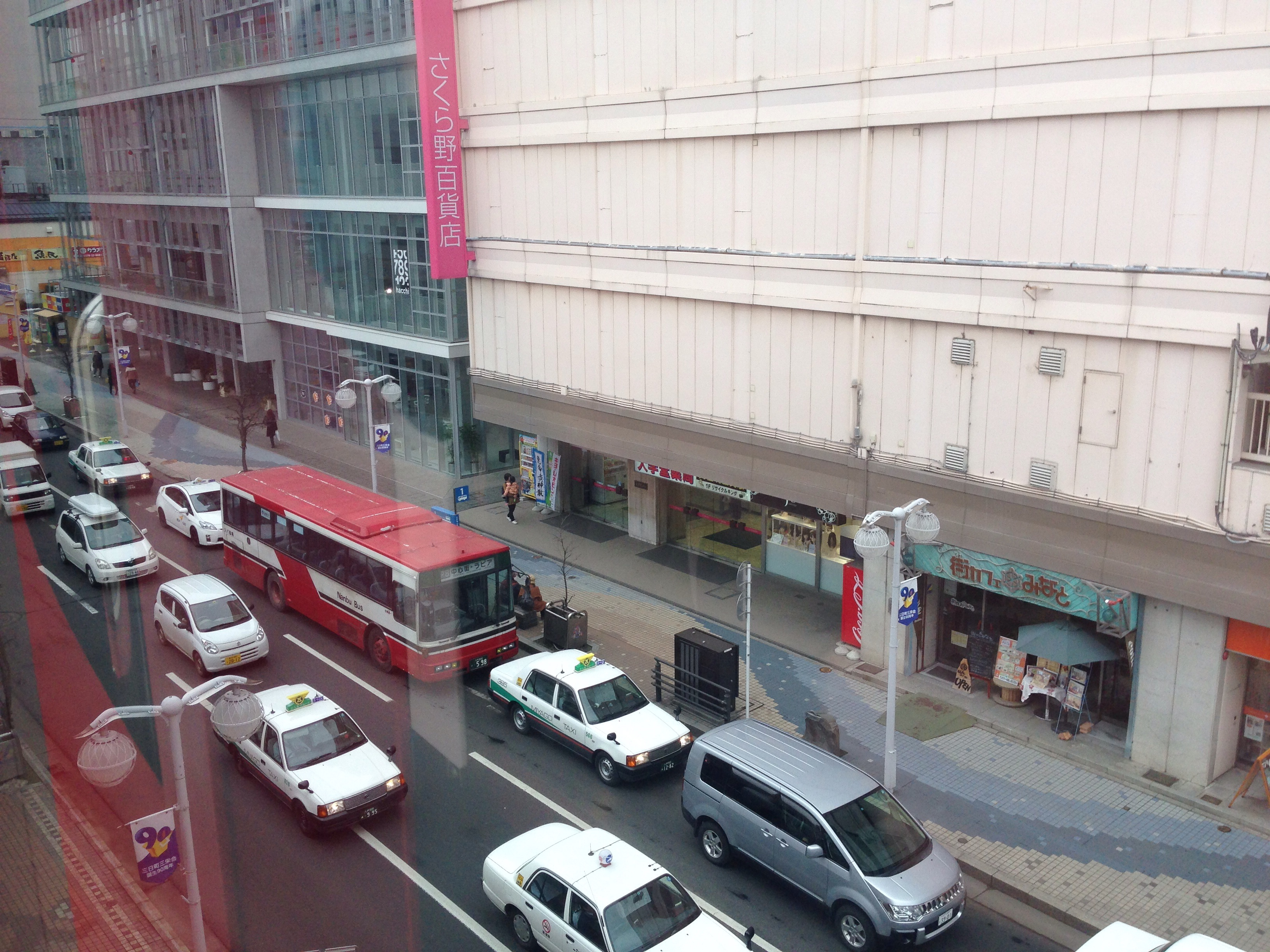 八戸中心街三日町付近